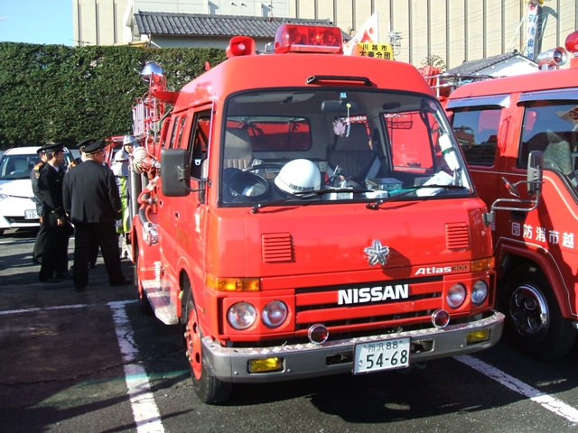 Nissan Atlas.